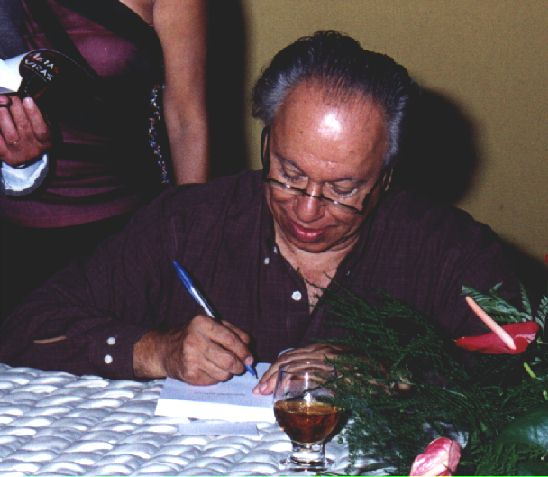 Haroldo Lima autografa, em 2003, o seu livro, em sessão da Academia Caetiteense de Letras. Imagem pertencente à Academia, gentilmente cedida para a Wikipédia, através de André Koehne